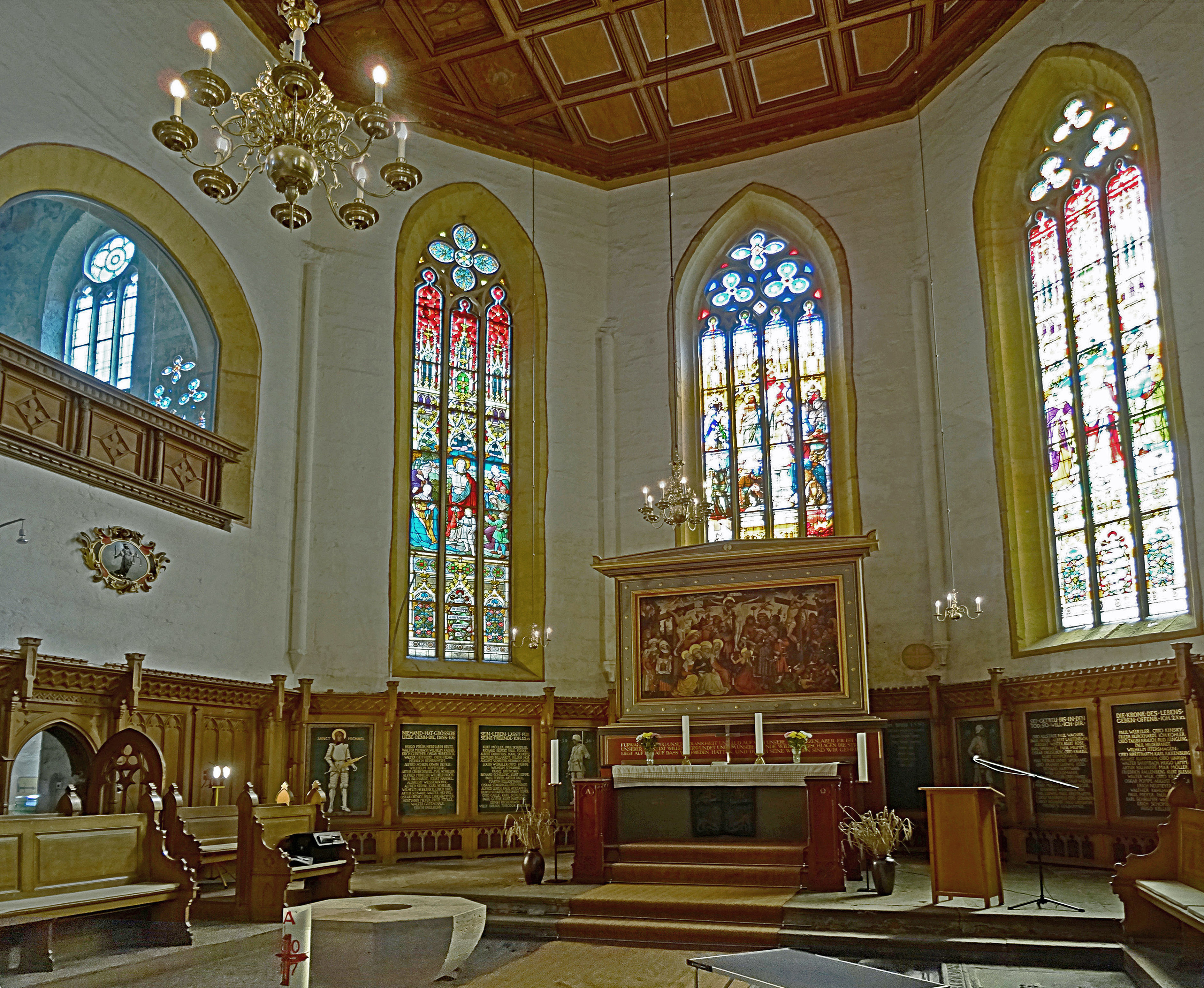 Altarraum der Marktkirche St. Bonifacius, Langensalza, mit dem Glasgemälde "Die Auferstehung Christi" von Franz Wenzel Schwarz (1842–1919), vermutlich in der Mitte.